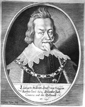 Leonhard Helfried Freiherr von Meggau (1577-1644) Obersthofkämmerer und Obersthofmeister unter Kaiser Matthias sowie Statthalter in Niederösterreich und Obersthofmeister unter Ferdinand II.